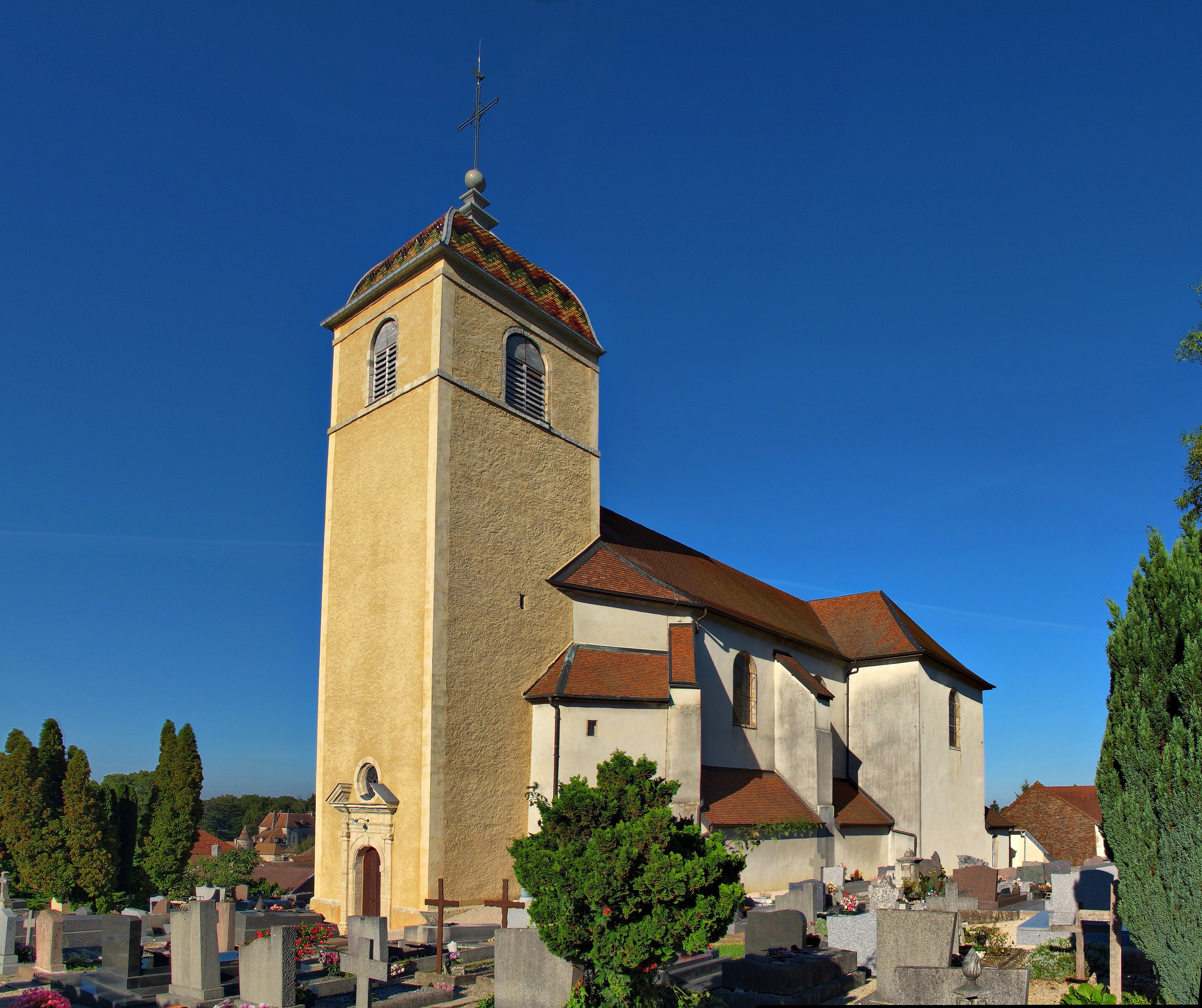 Église Saint-Lazare de Bonnay (Classé) .